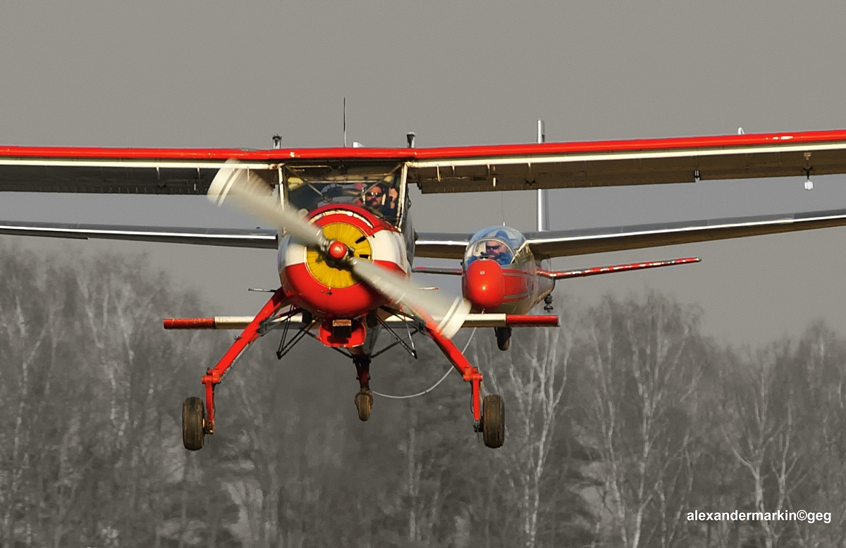 Avia train